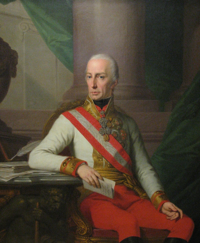 Porträt des Kaisers Franz I. von Österreich (1768-1835)